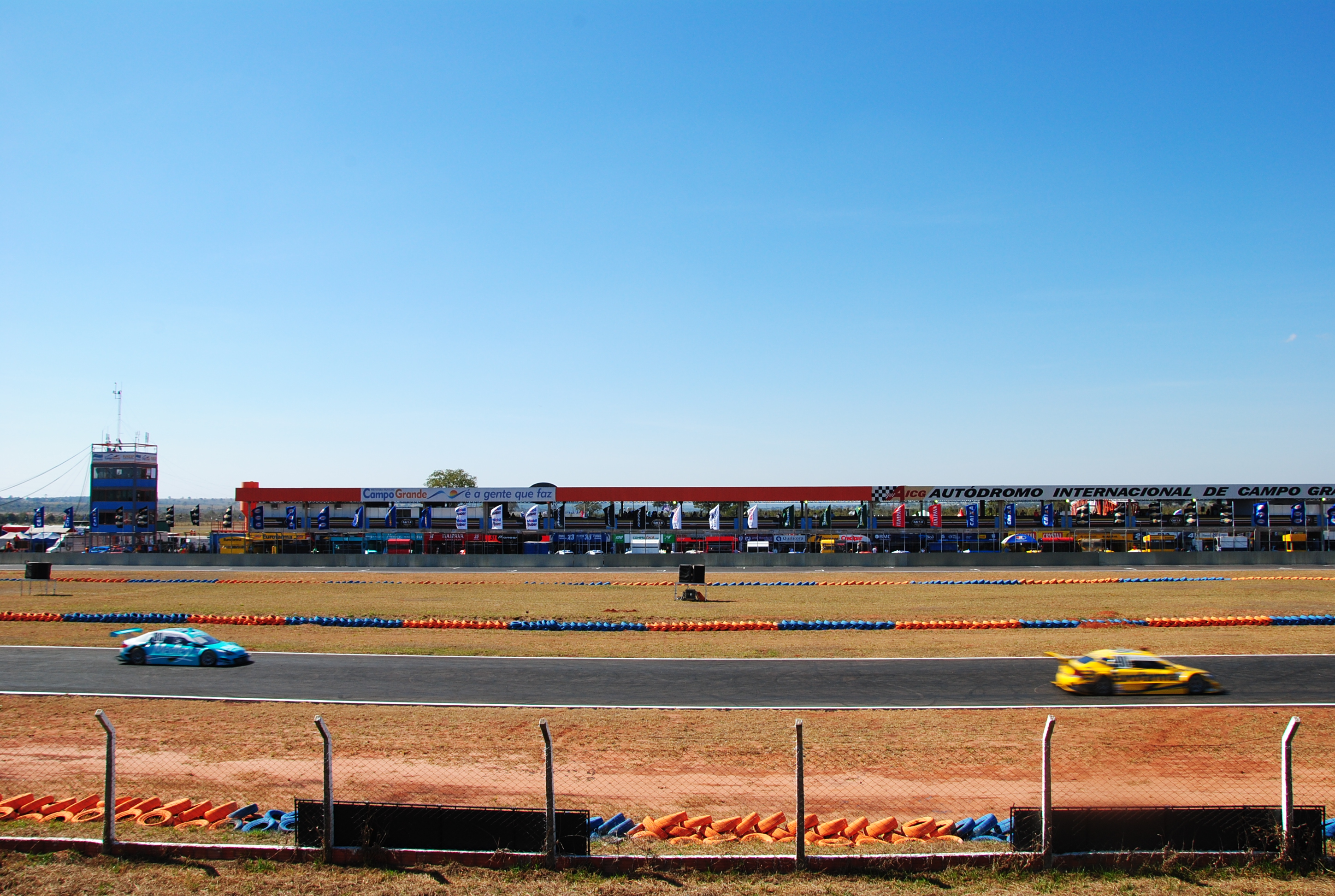 Stock Car Brasil series. Autódromo de Campo Grande, MS.